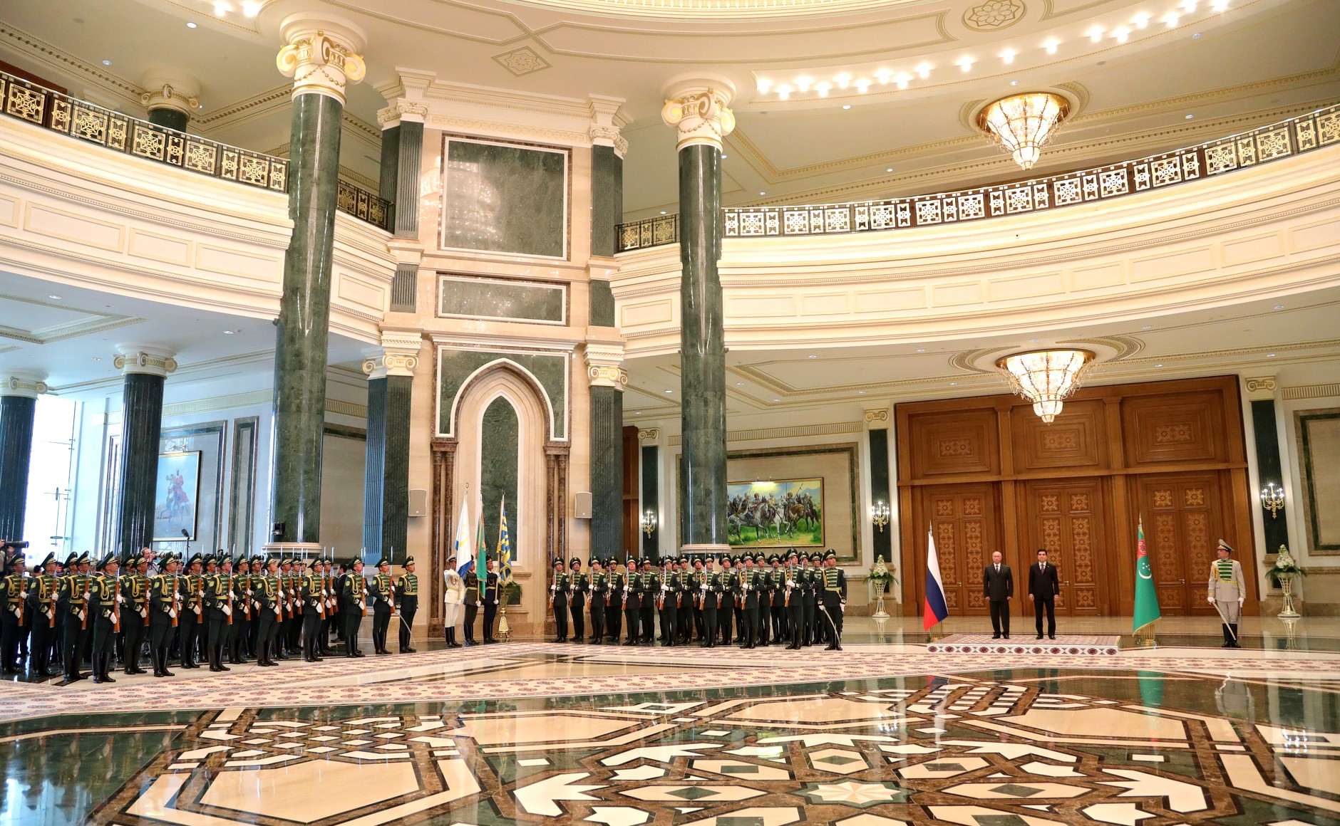 Президент России Владимир Путин с Президентом Туркменистана Гурбангулы Бердымухамедовым